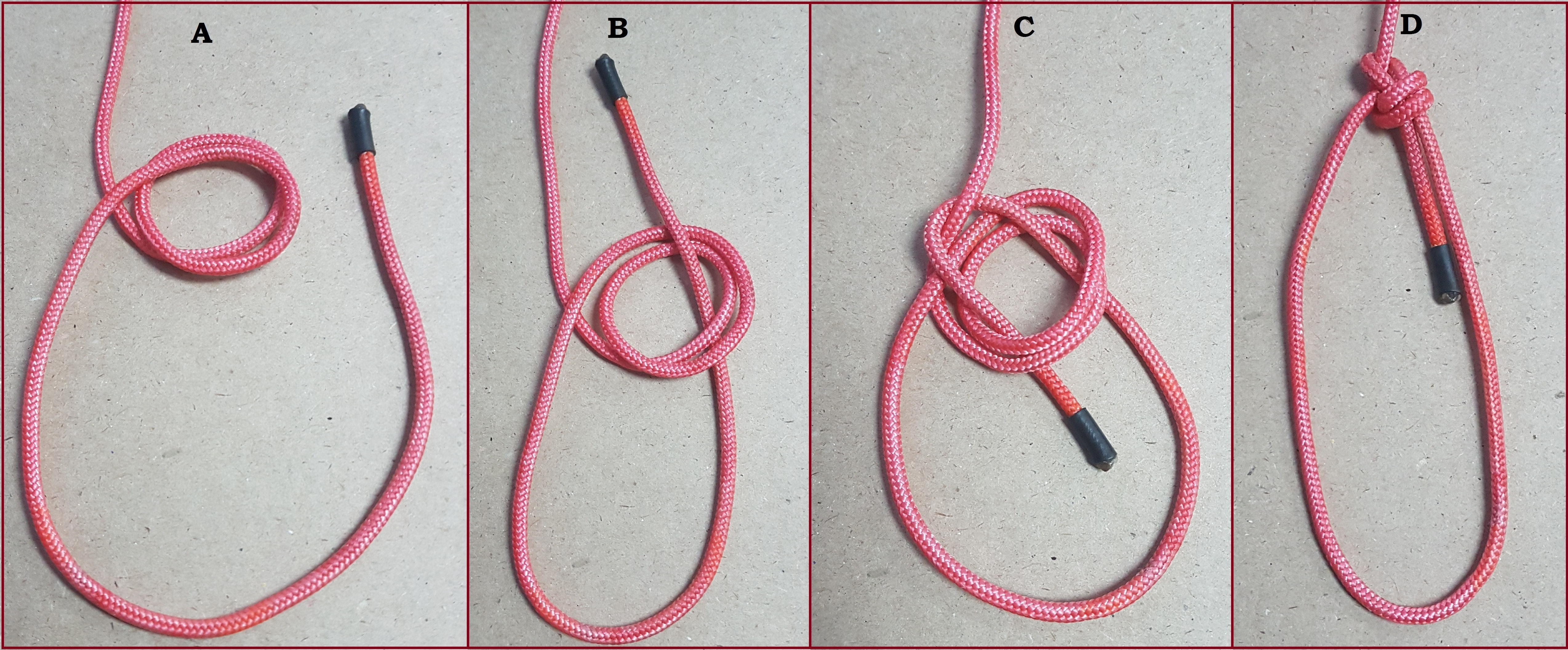 Foto was stapsgewys aandui hoe om die Dubbele Bowlineknoop to knoop.